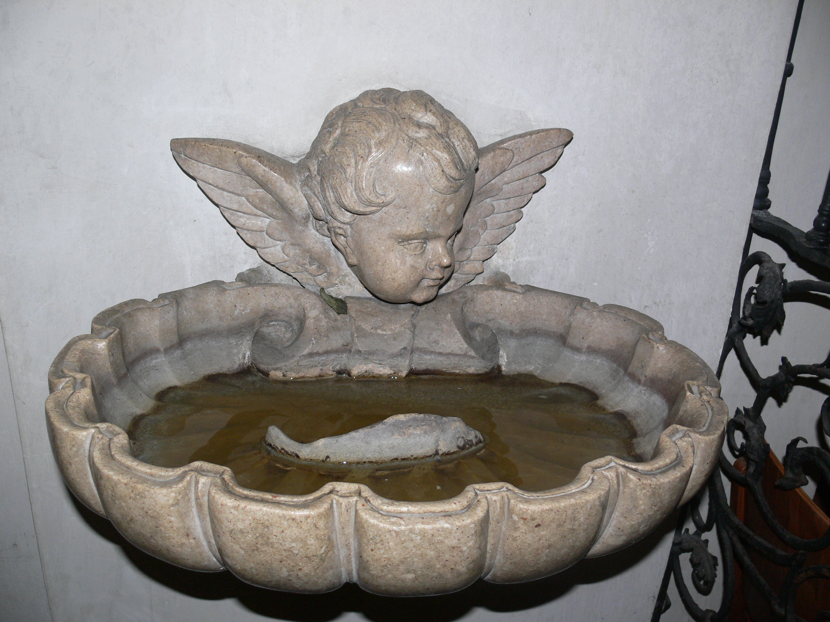 Kajetanerkirche am Kajetanerplatz, Salzburg (Eines von zwei) Weihwasserbecken mit schwimmendem Fisch, wohl von M. W. Weißkirchner